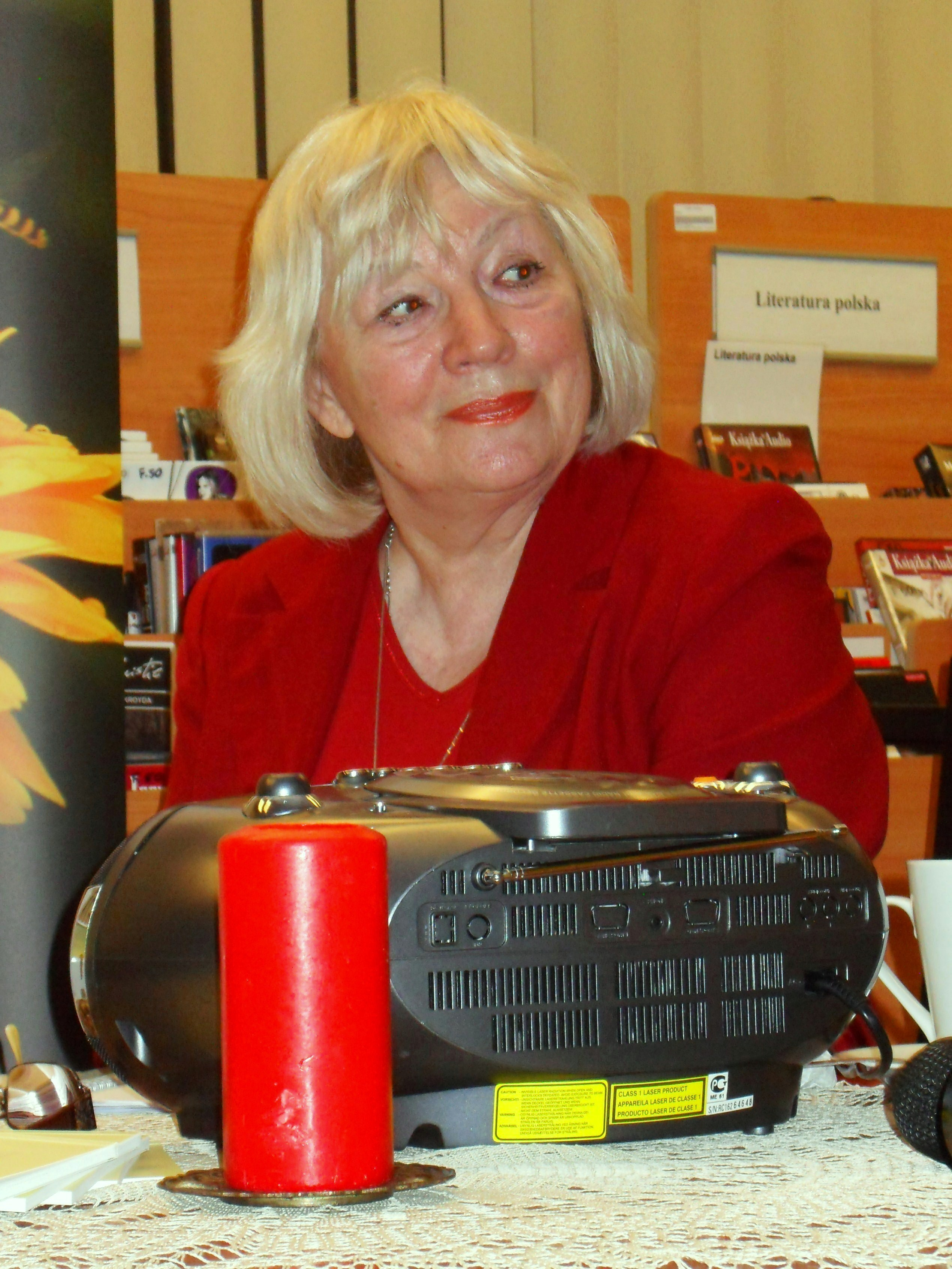 Aktorka Wanda Neumann.